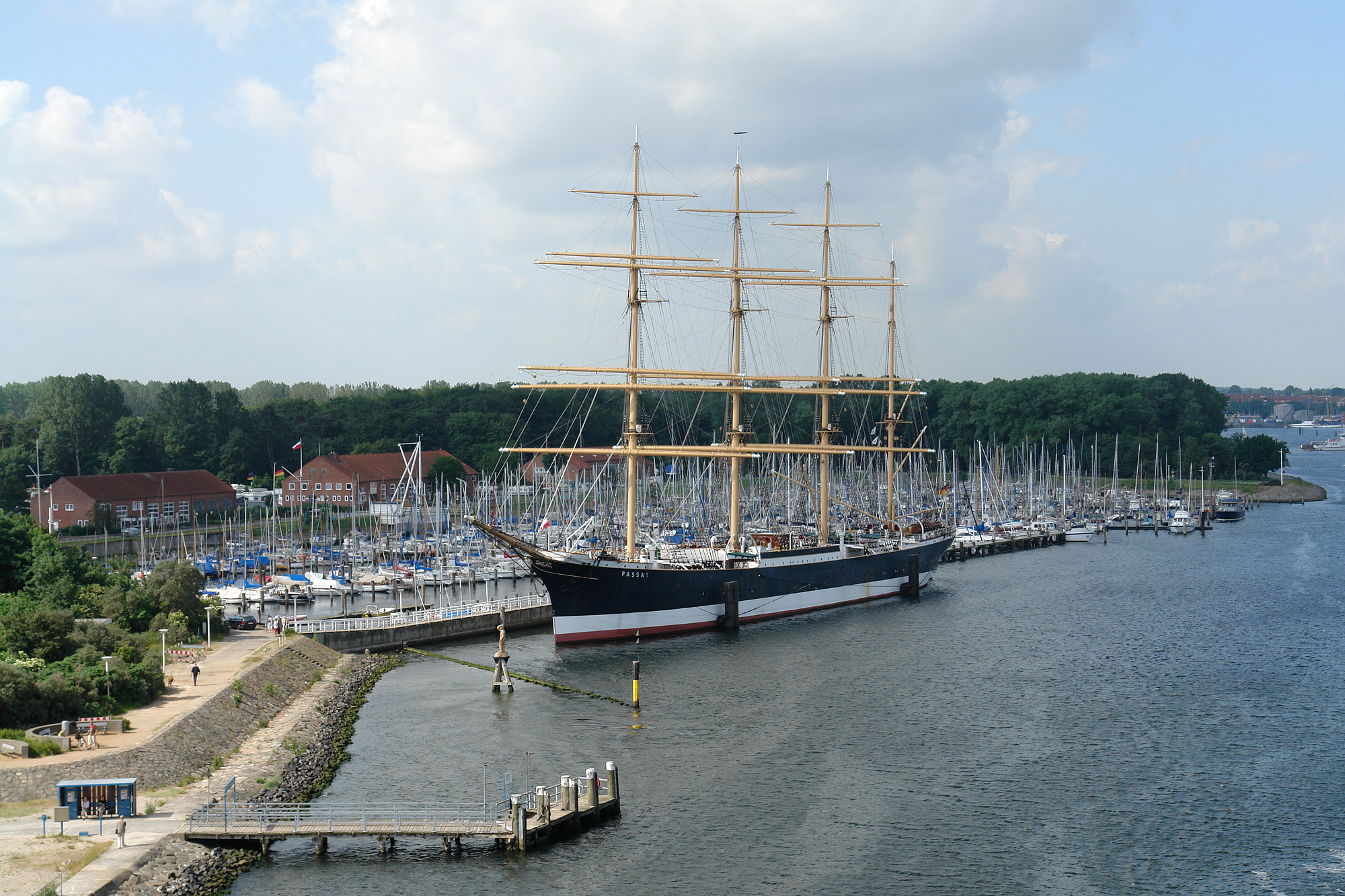 Viermast-Stahlbark Passat, ein Museumsschiff in Travemünde.